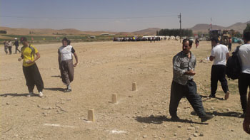 بازی محلی دال پلان